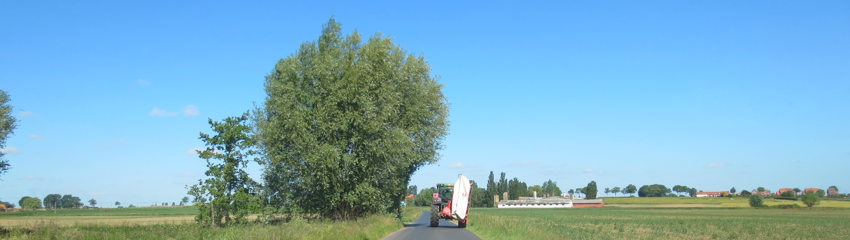 Wijtschate